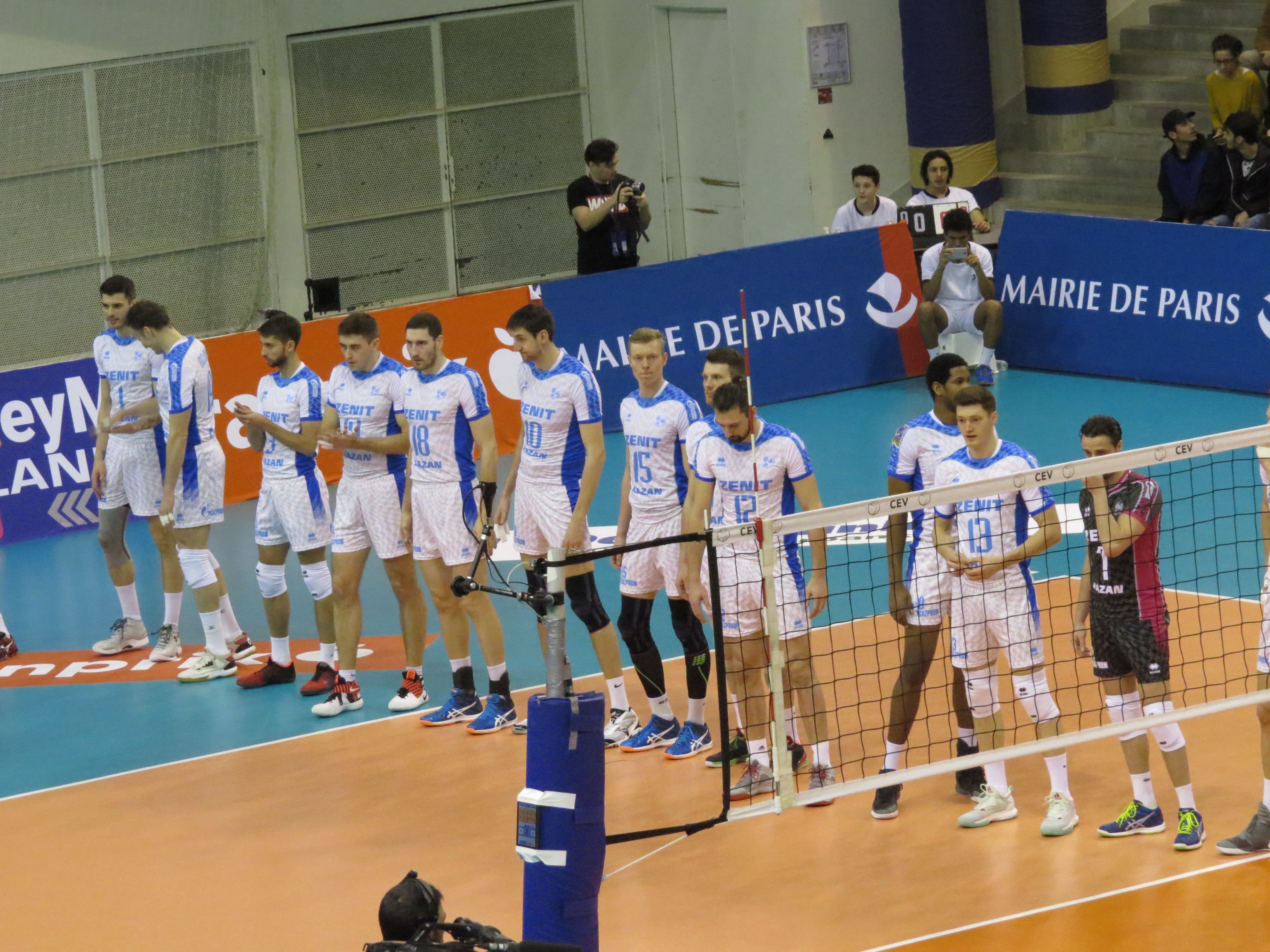 Photo réalisée lors du match de ligue des champions de volley entre le Paris Volley et Zenith Kazan